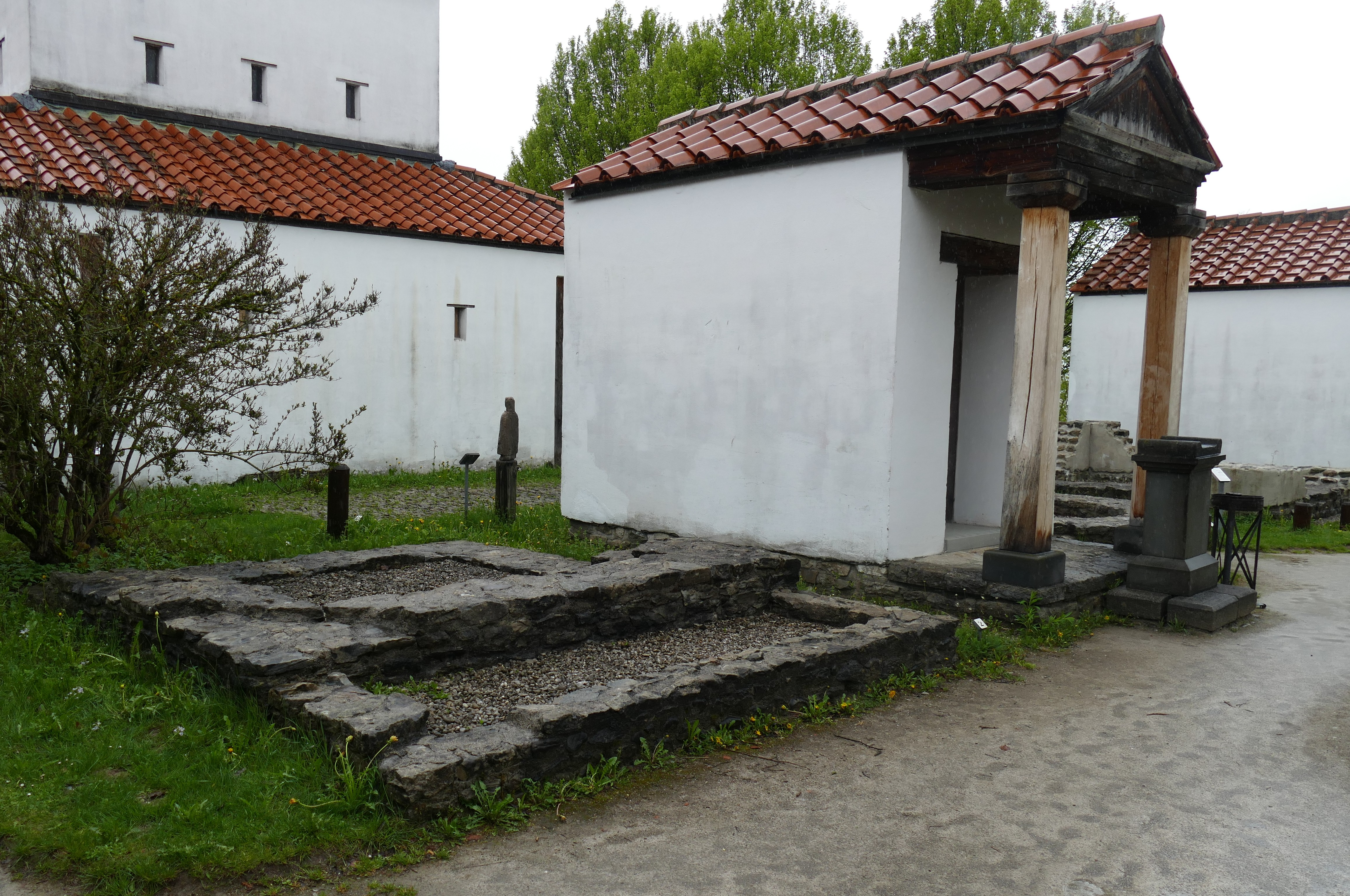 Rechtecktempelchen in Cambudunum. Links die Grundmauern etwa entsprechend der Ausgrabung von Loja Gebäude I 1936. Rechts eine Rekundstuktion.